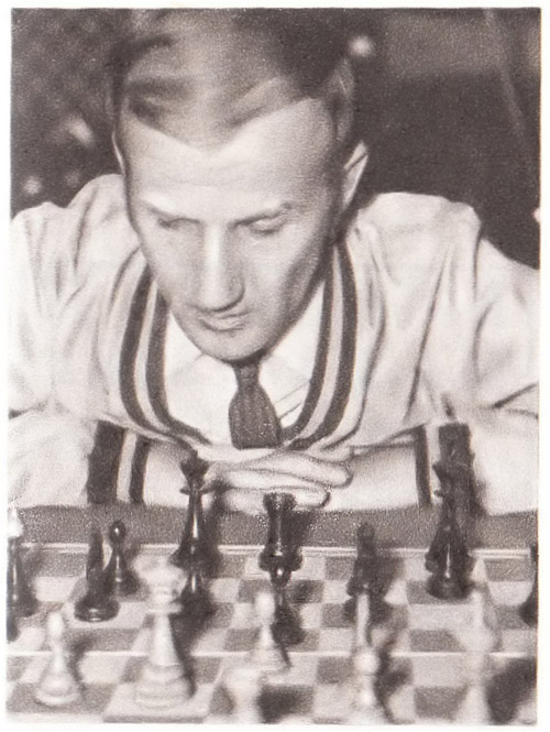 Romuald Grąbczewski (ur. 7 lutego 1932 w Warszawie, zm. 20 sierpnia 2005 w Warszawie) – polski szachista, mistrz międzynarodowy od 1972 roku.